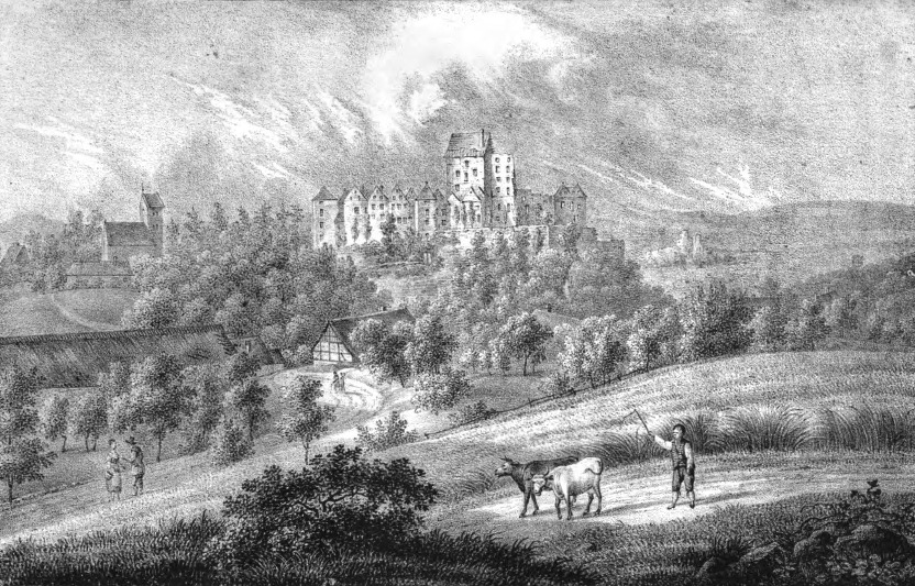 Burgruine Schweinhaus in Niederschlesien